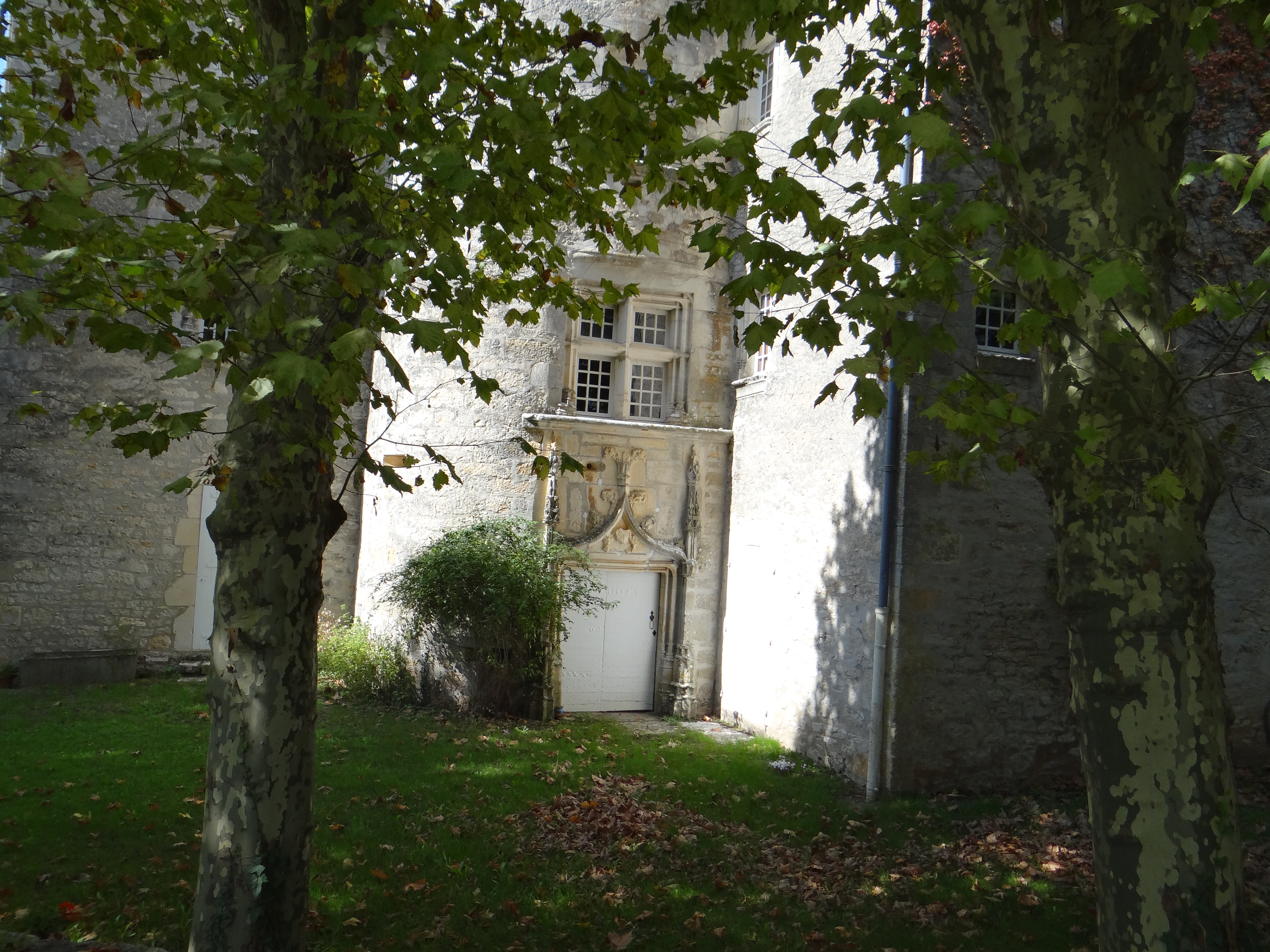 Détail de la porte principale du château de Mayrac (Lot, France)